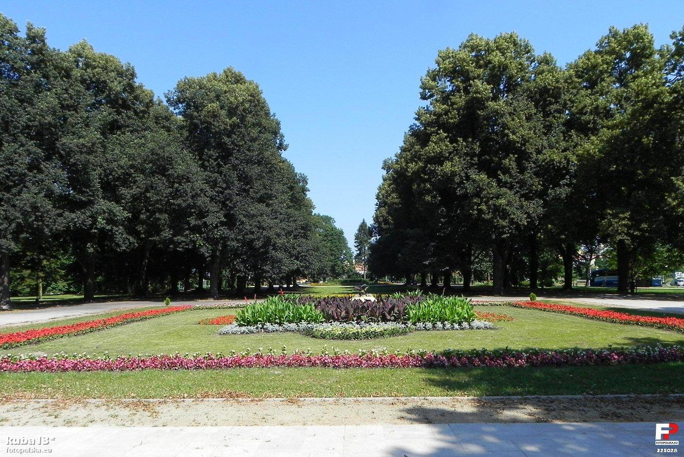 Park Miejski w Zamościu, jak w reklamie - prawdopodobnie najpiękniejsze modernistyczne założenie zieleni w Polsce. Powstał na terenach pofortecznych w latach 1919-1926, wg konkursowego projektu opracowanego przez Waleriana Kronenberga.